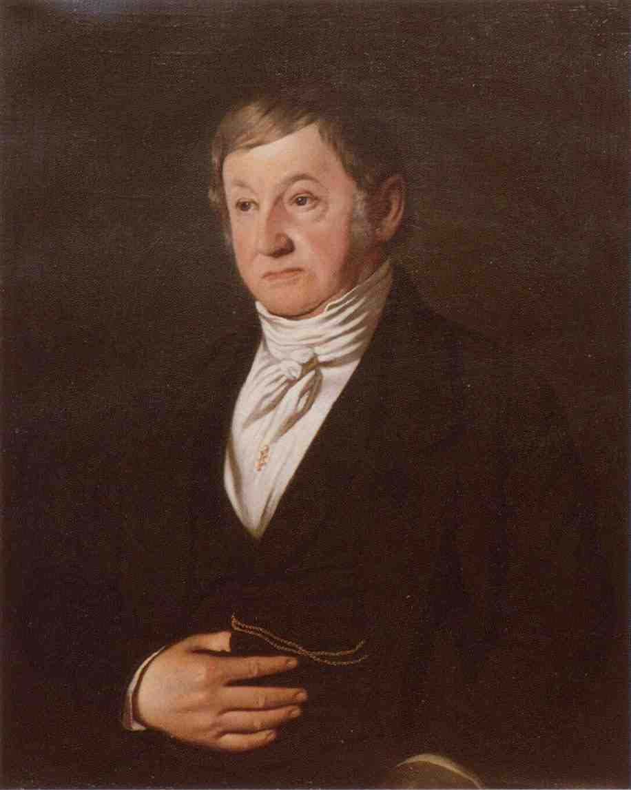 Johann Heinrich Staub (1781–1854), Ölporträt eines unbekannten Schqweizer Malers.